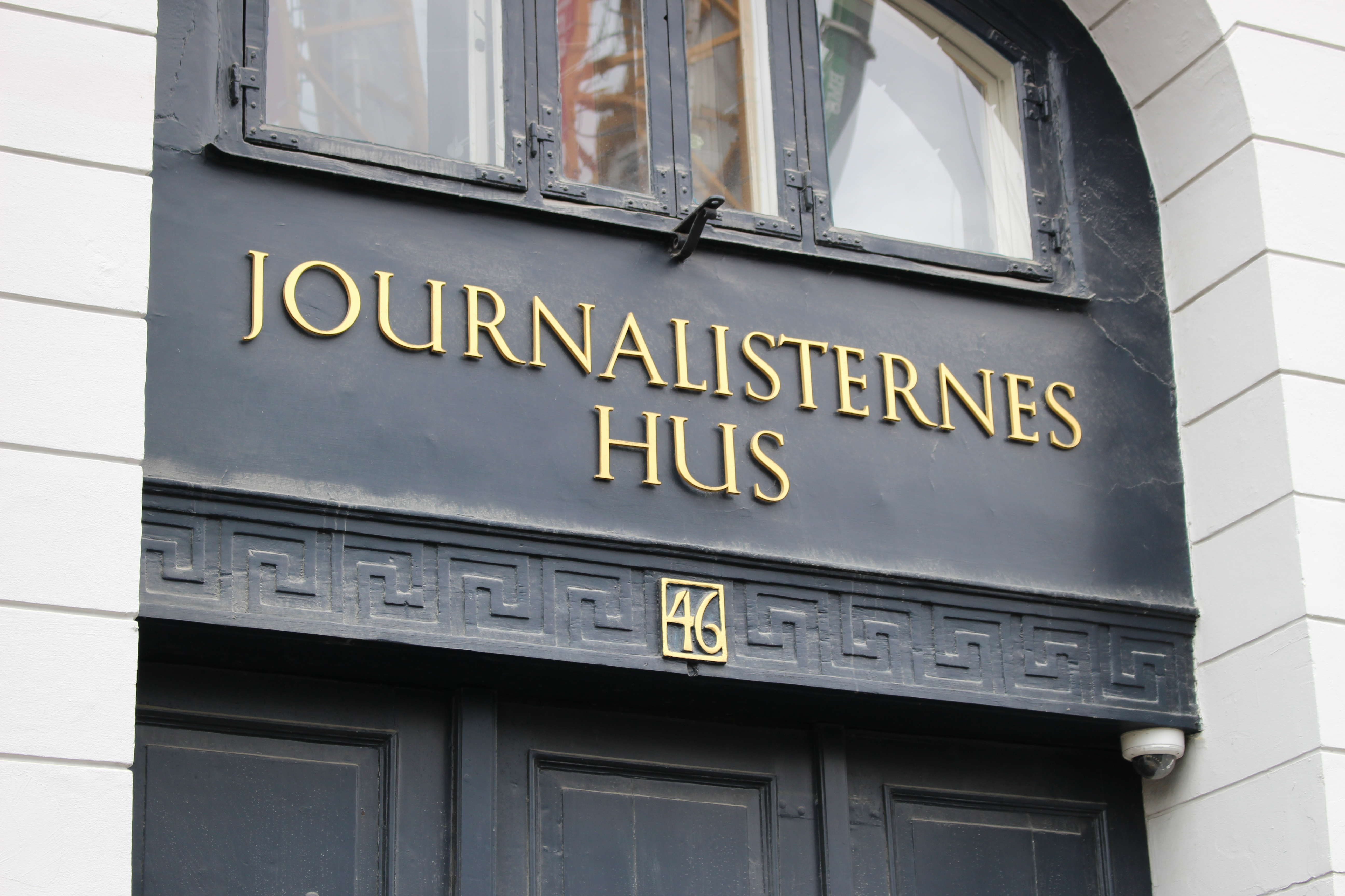 Journalisternes Hus, indgangen på Gammel Strand.